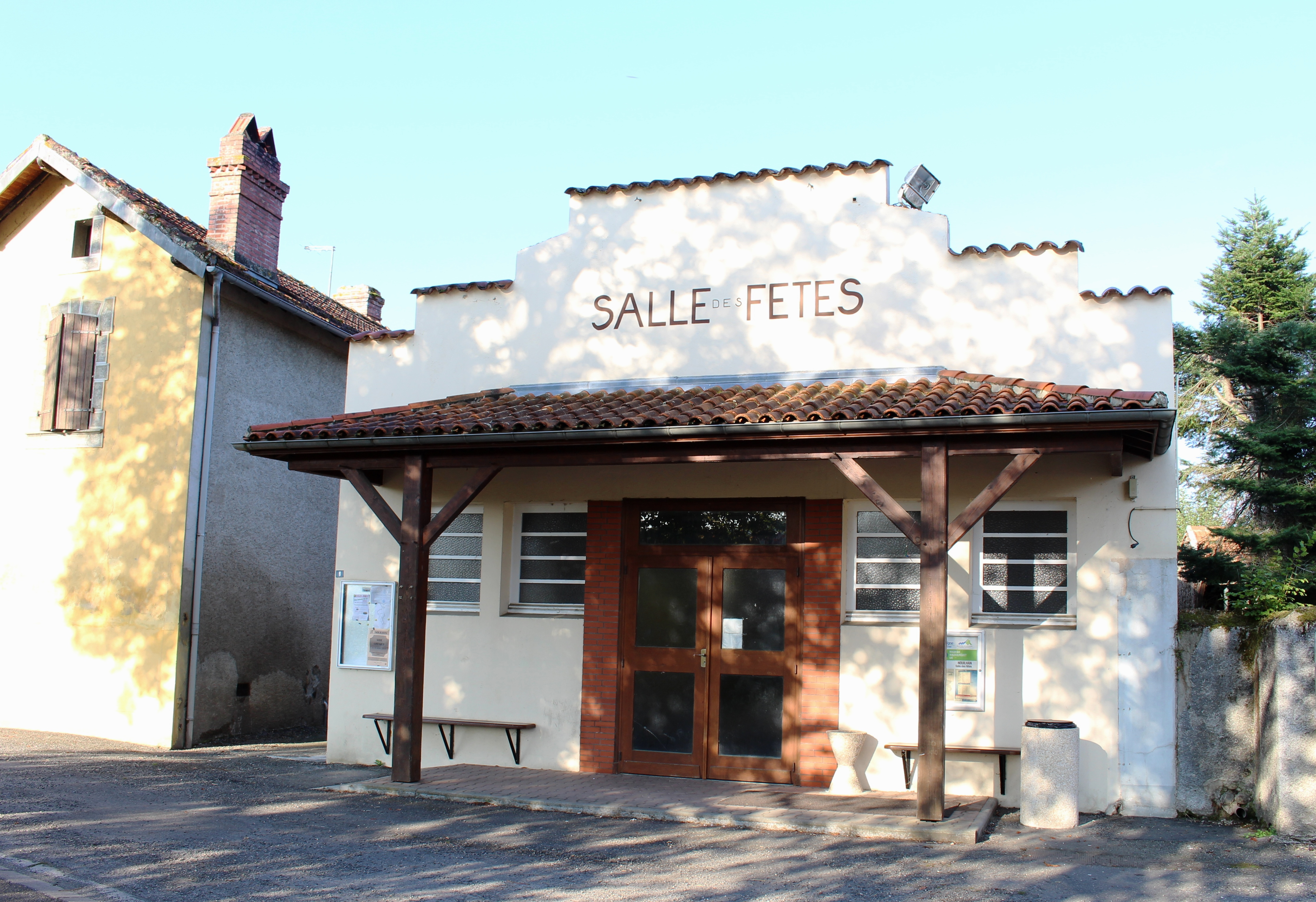 Salle des fêtes de Nouilhan (Hautes-Pyrénées)